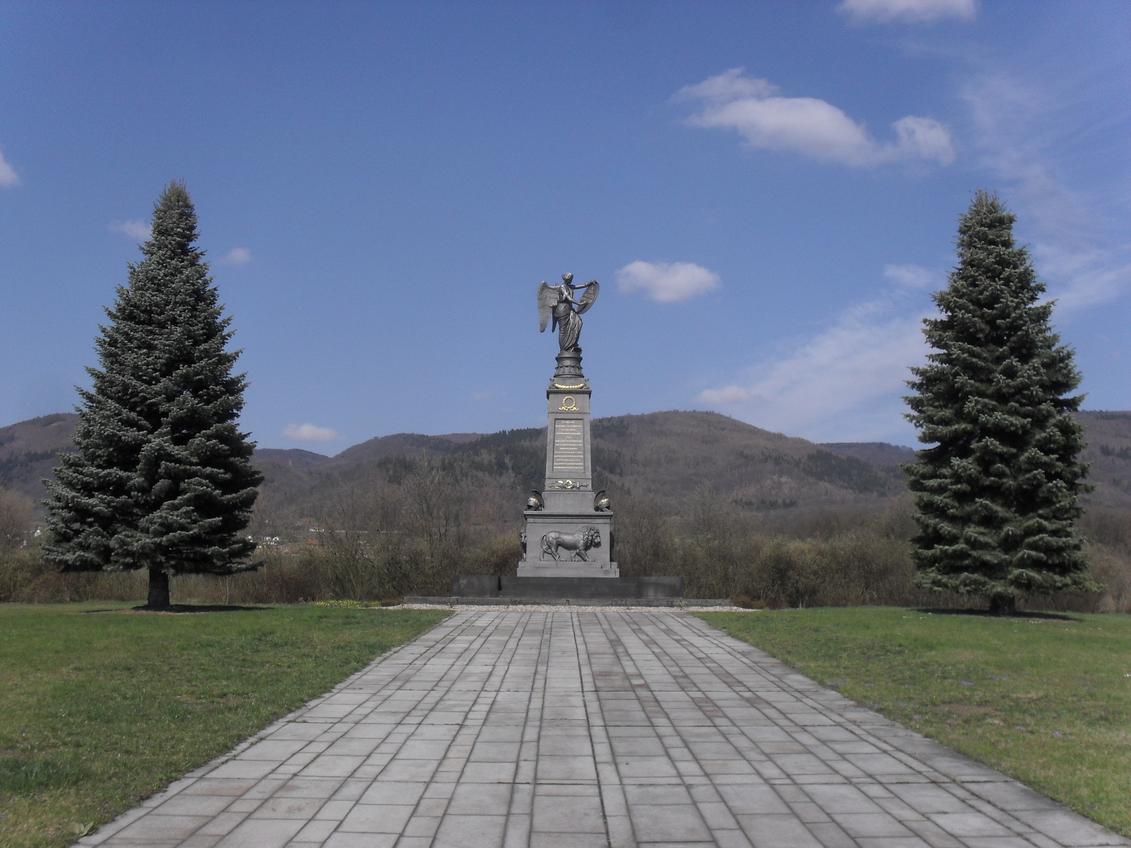 Ruský památník bitvy o Chlumec, kde roku 1813 došlo k porážce Napoleonských vojsk.